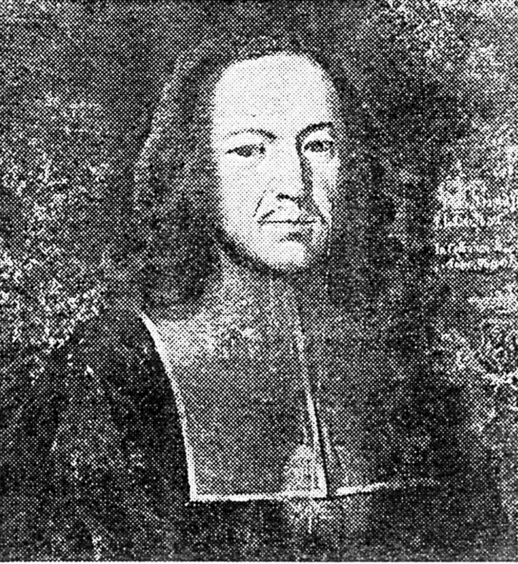 Johann David Feyerabend, Bürgermeister Heilbronns 1683 bis 1716